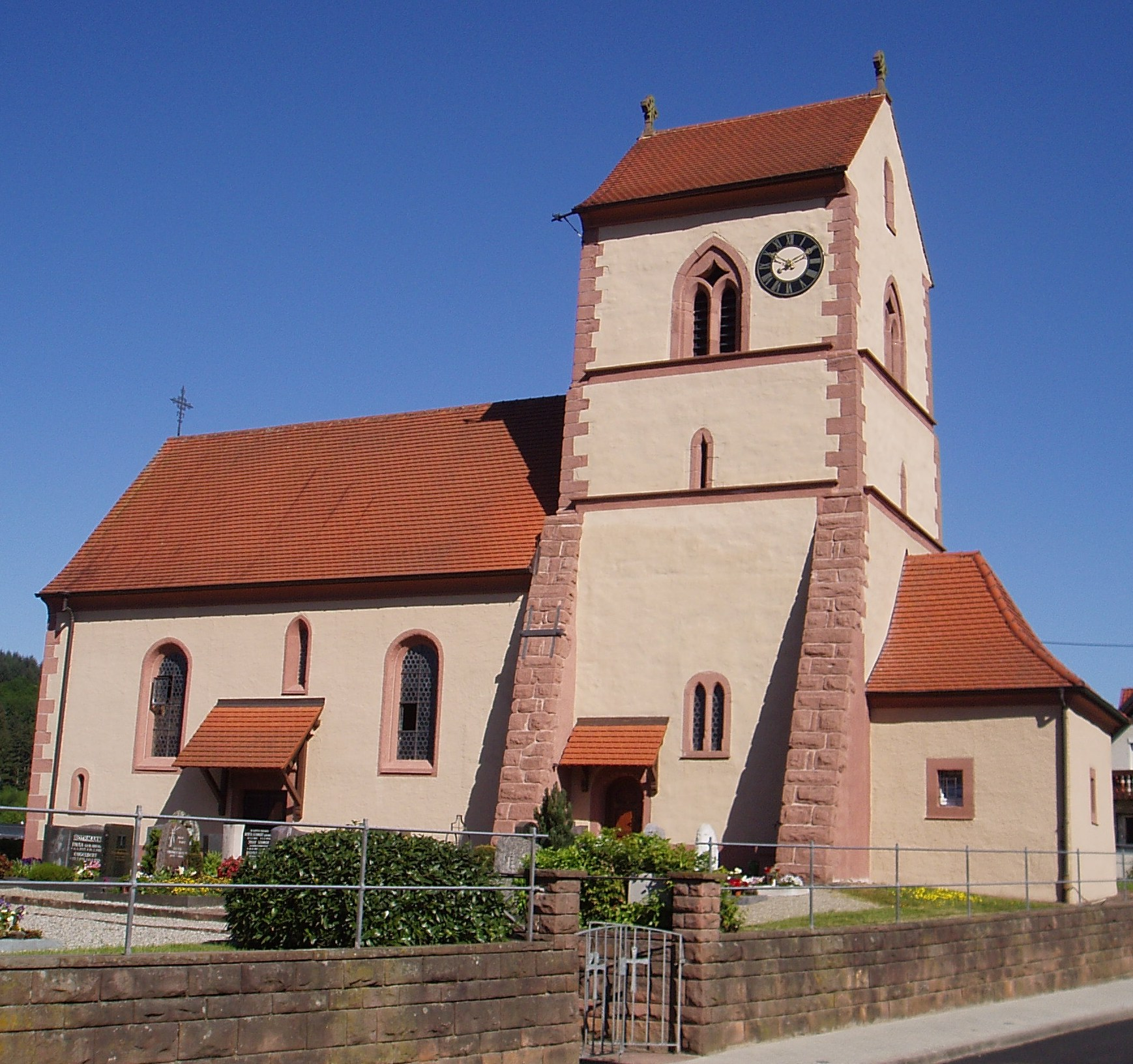 Die Kirche von Wittelbach im Jahr 2007